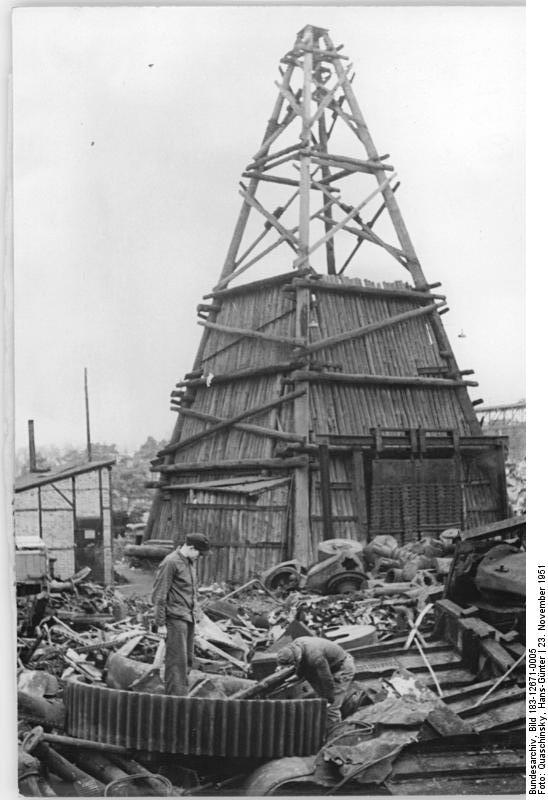 Volkseigener Schrottaufbereitungsbetrieb Gerwisch - Sachsen-Anhalt. Für unsere Friedenswirtschaft, für die Erfüllung und Übererfüllung unseres Fünfjahrplanes ist es von grosser Bedeutung, den Schrott zu sammeln, aufzuarbeiten und der Neuproduktion wieder zuzuführen, um so an der Steigerung der Produktion von Bedarfsgütern beizutragen. Auch in Westdeutschland werden grosse Schrottaktionen durchgeführt; im Gegensatz zu unserer Deutschen Demokratischen Republik jedoch findet der Schrott lediglich für Rüstungszwecke Verwendung. Der grösste Schrottaufbereitungsbetrieb der Deutschen Demokratischen Republik befindet sich in Gerwisch, der heute schon 120 Arbeitskräfte beschäftigt, die in drei Schichten arbeiten. Dem Betrieb war es möglich, bereits im November den Volkswirtschaftsplan 1951 zu erfüllen. UBz: Das Fallwerk, in dem Gußschrott mit einer 3 to schweren Kugel zerkleinert wird.. Illus Quaschinsky 23.11.1951